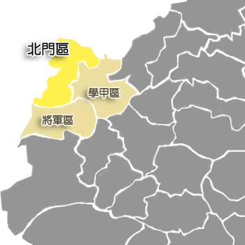 中文（台灣）: 臺南市北門區相對位置。